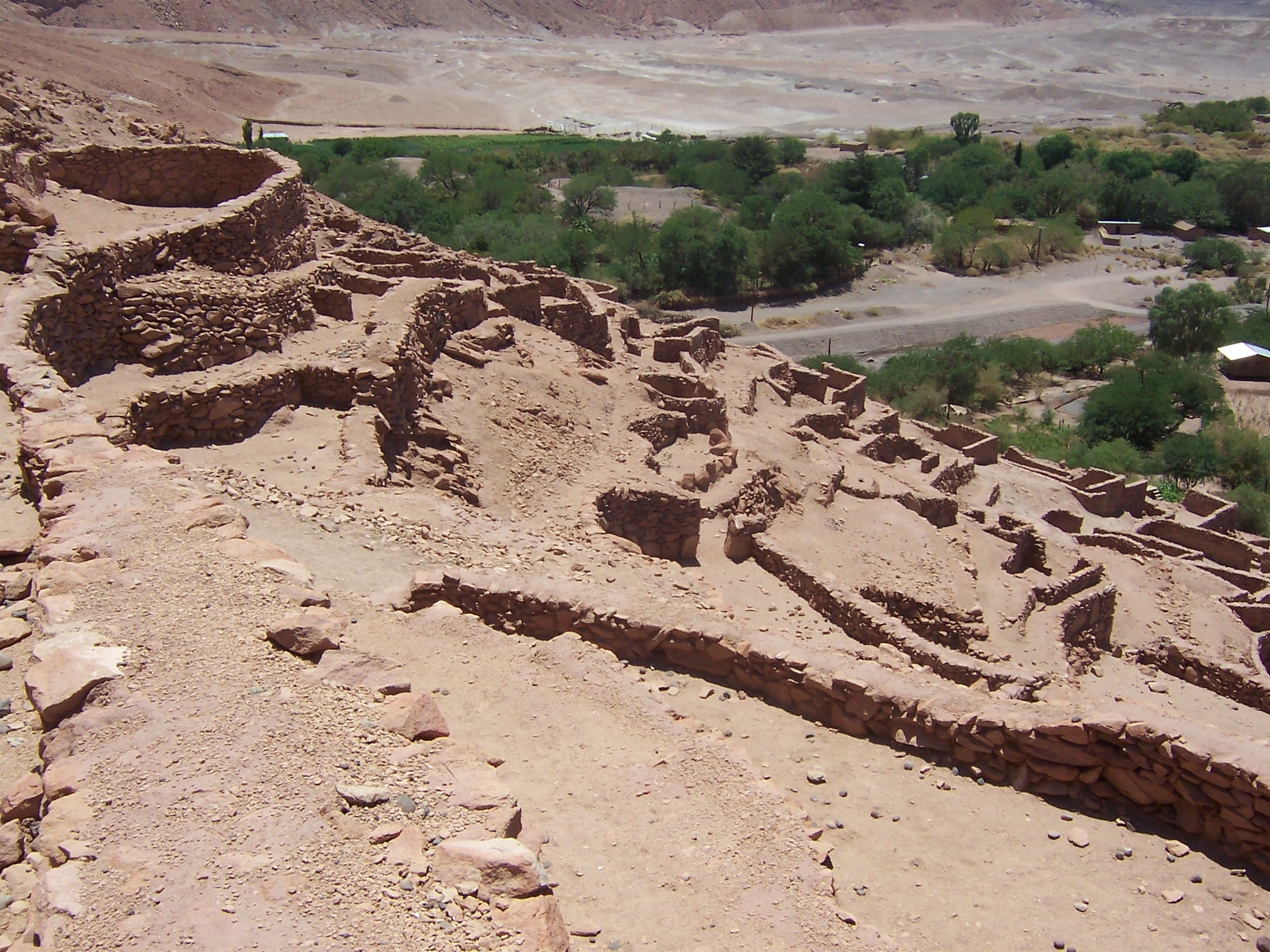 Pukará de Quitor 2 - Foto por Daniel Gutiérrez P